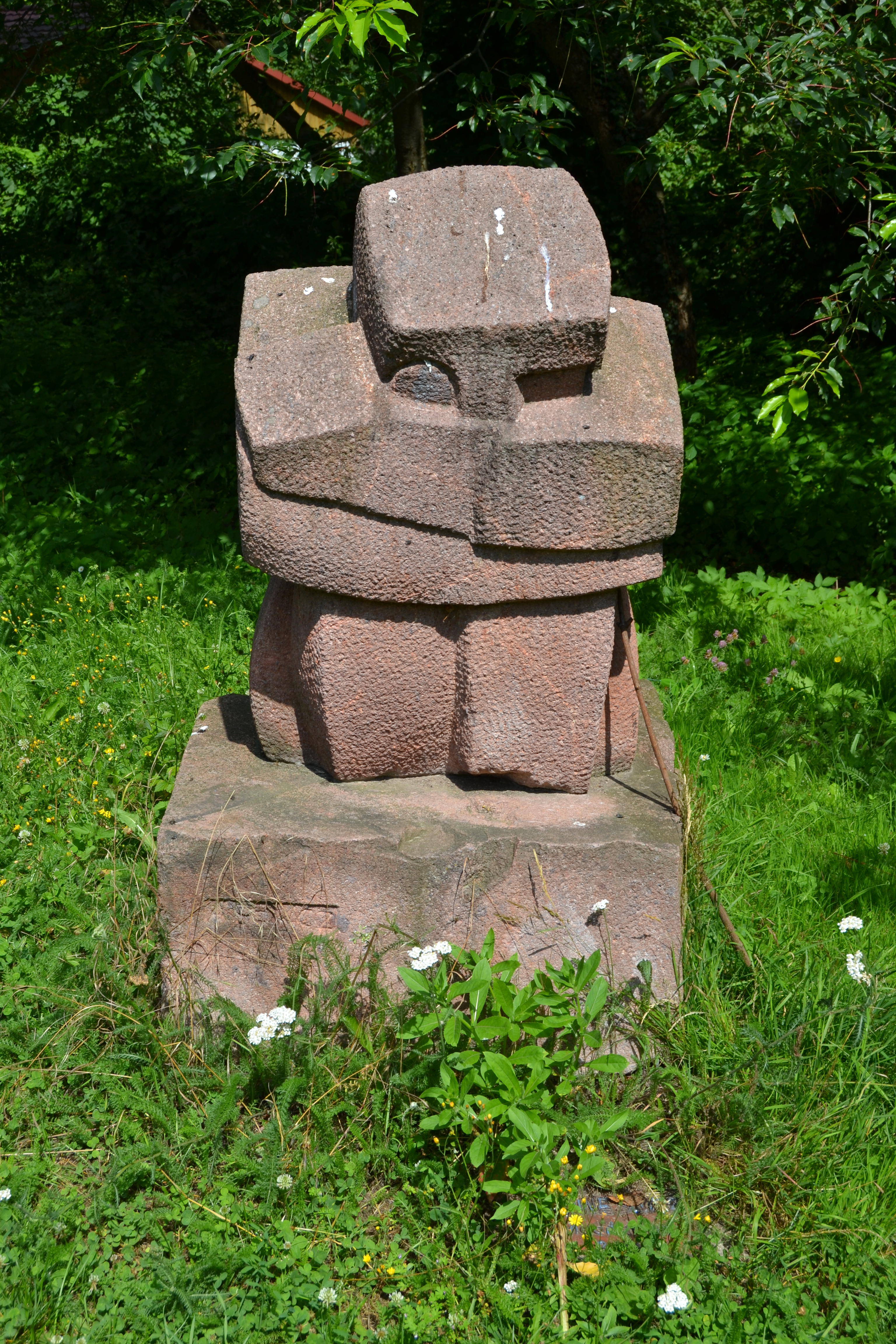 Statue "Meditation" von Anne Sewcz aus dem Jahr 2000 im Kleinen Spreewalspark in Schöneiche bei Berlin.